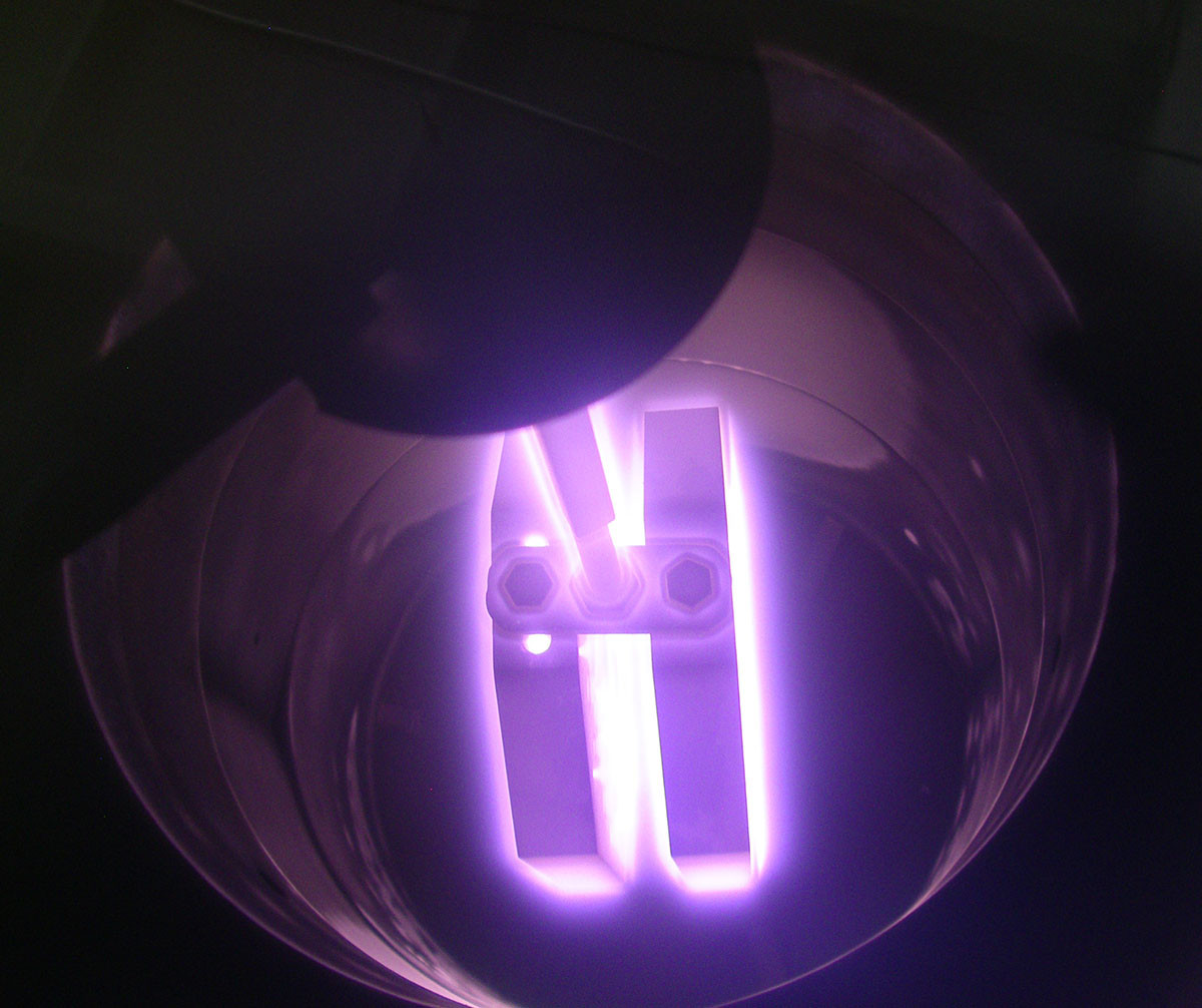 Азотирование в тлеющем разряде